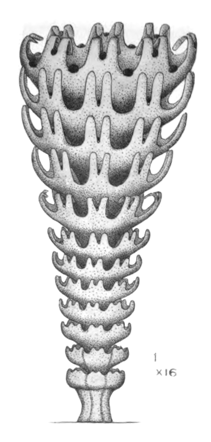 Strobila di Cyanea lamarcki